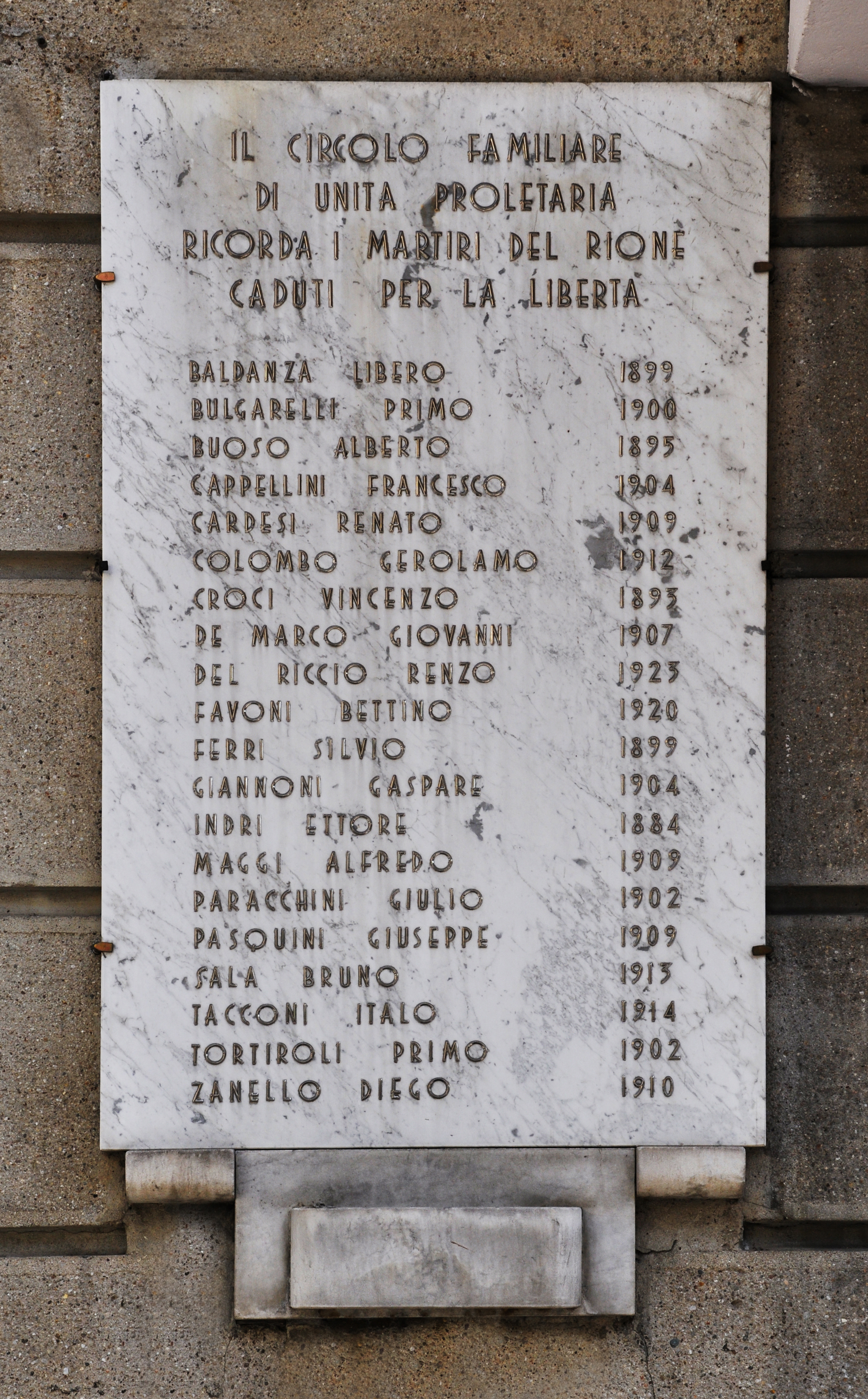 Lapide via Monte San Michele Sesto San Giovanni